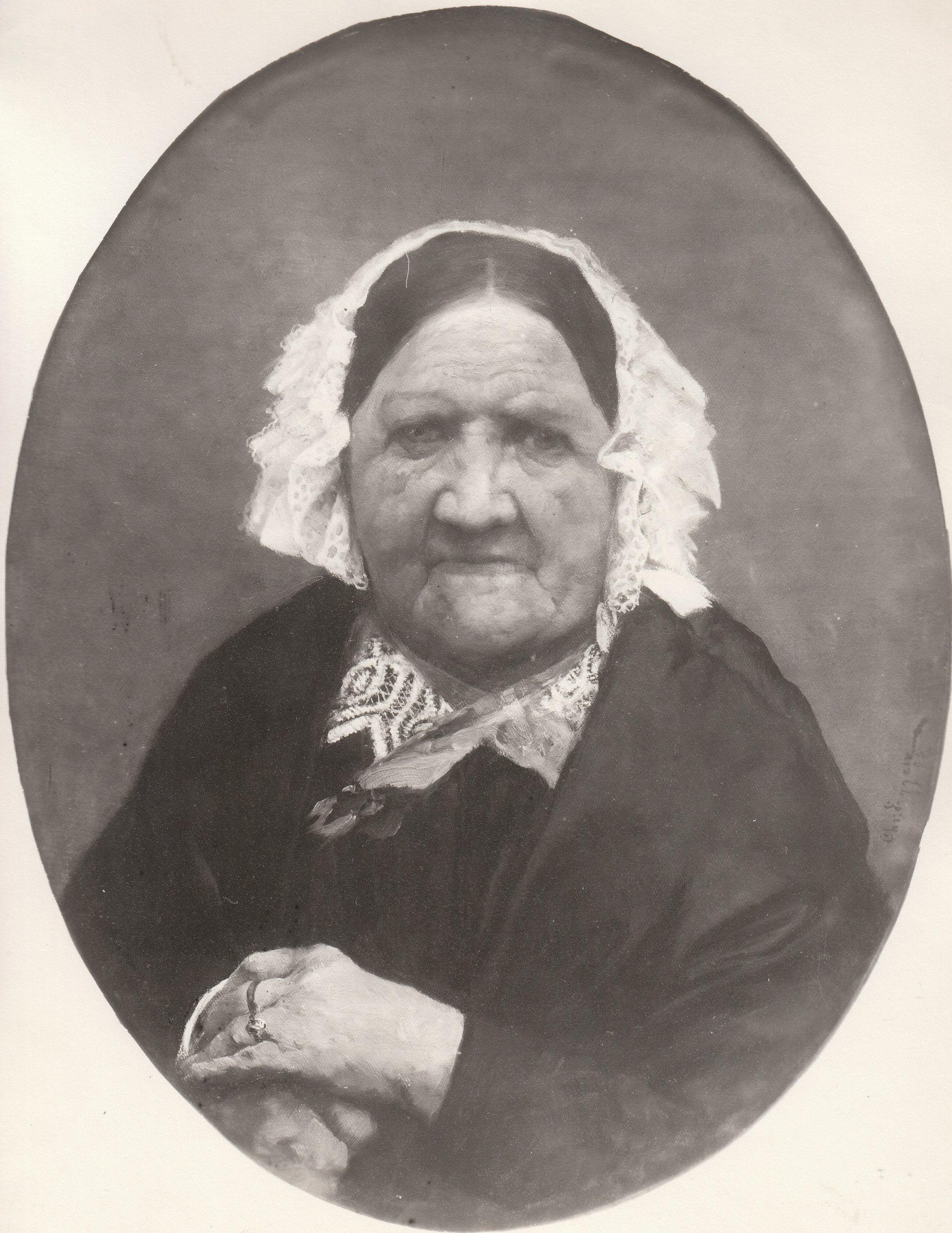 Format: Fotopositiv. Dorothea Marie Vauvert Angell ble født den 18 februar 1780 i Storfosen, Ørland, Sør-Trøndelag. Hun var datter av Hans Lorentzen Angell (1749 - 1822) og Hedevig Brøcker (1750 - 1788). Dorothea Marie Vauvert Angell giftet seg med Ole Krabbe (1758 - 1826), sønn av Fredrik Christian Krabbe (1713 - 1776), i 1797. Dorothea Marie Vauvert Angell døde den 22 oktober 1862 i Gisvold, Orkdal, Sør-Trøndelag, i en alder av 82. Barn av Dorothea Marie Vauvert Angell og Ole Krabbe: Frederik Christian Krabbe (1798 - 1875) Hedevig Brøcher Krabbe (1800 - 1862) Hentet fra Erik Berntsens slektssider: Fra utstillingen i anledning Trondhjems 900-årsjubileum i 1897. Utstillingstekst i Trondhjems 900 Aars Jubilæum: Katalog for Den Historiske Udstilling i Trondhjem 1897: 557. Krabbe, Dorothea Marie, f. Angell, f. 1779, d. 1862; foreg.s Ole Krabbe (1758 - 1826) Hustru, Dtr. af Justitsraad Hans Angell til Gjølme i Orkedalen (f. 1749, d. 1822). OM., Brystbill. i 1/4 Størr. af Chr. Eggen efter Fotografi. Fru Konsul Lysholm, Smedstuen.